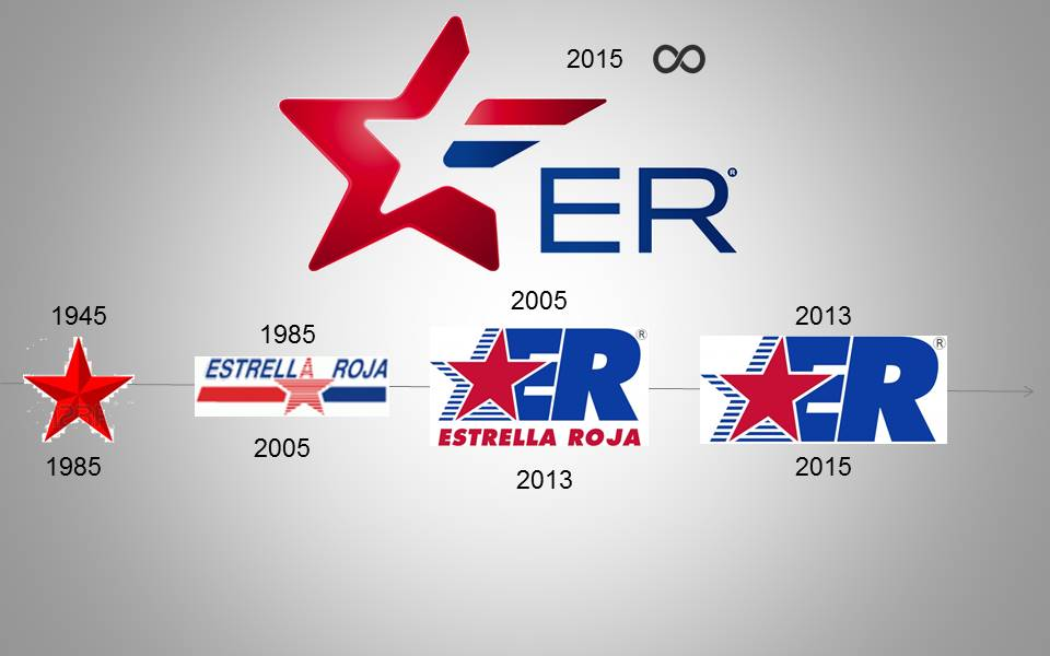 Evolución de su logo desde su fundación en 1945 hasta el día de hoy